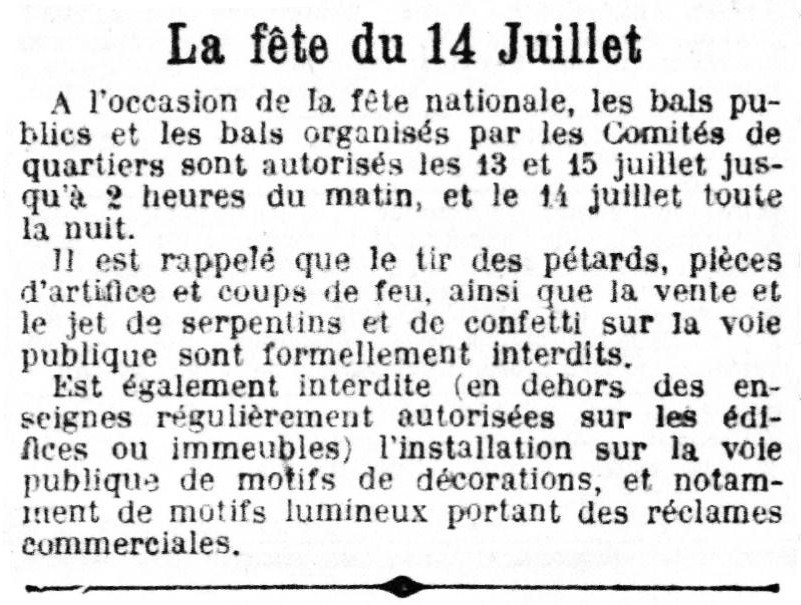 L'annonce énumère des interdits dont ceux des confettis et des serpentins. La Croix, rubrique Chronique parisienne, page 5, 4ème colonne.